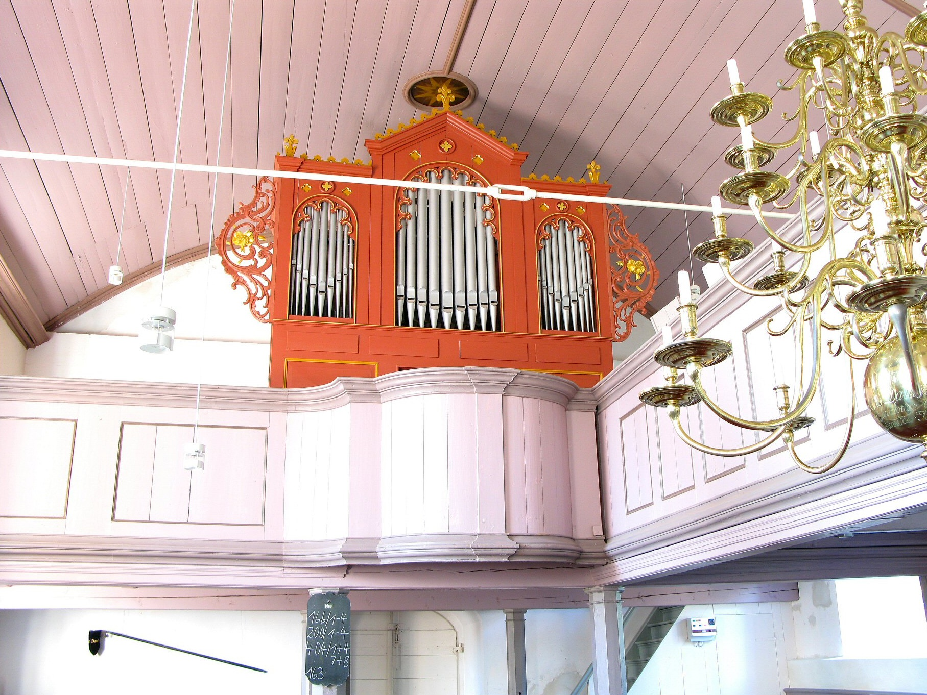 Orgel in Berdum, Landkreis Wittmund